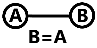 Extensor de nó